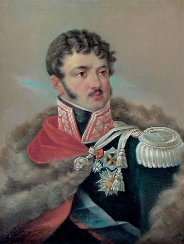 Józef Kasper Pochwalski (1816-1875). Portret ks. Józefa Poniatowskiego